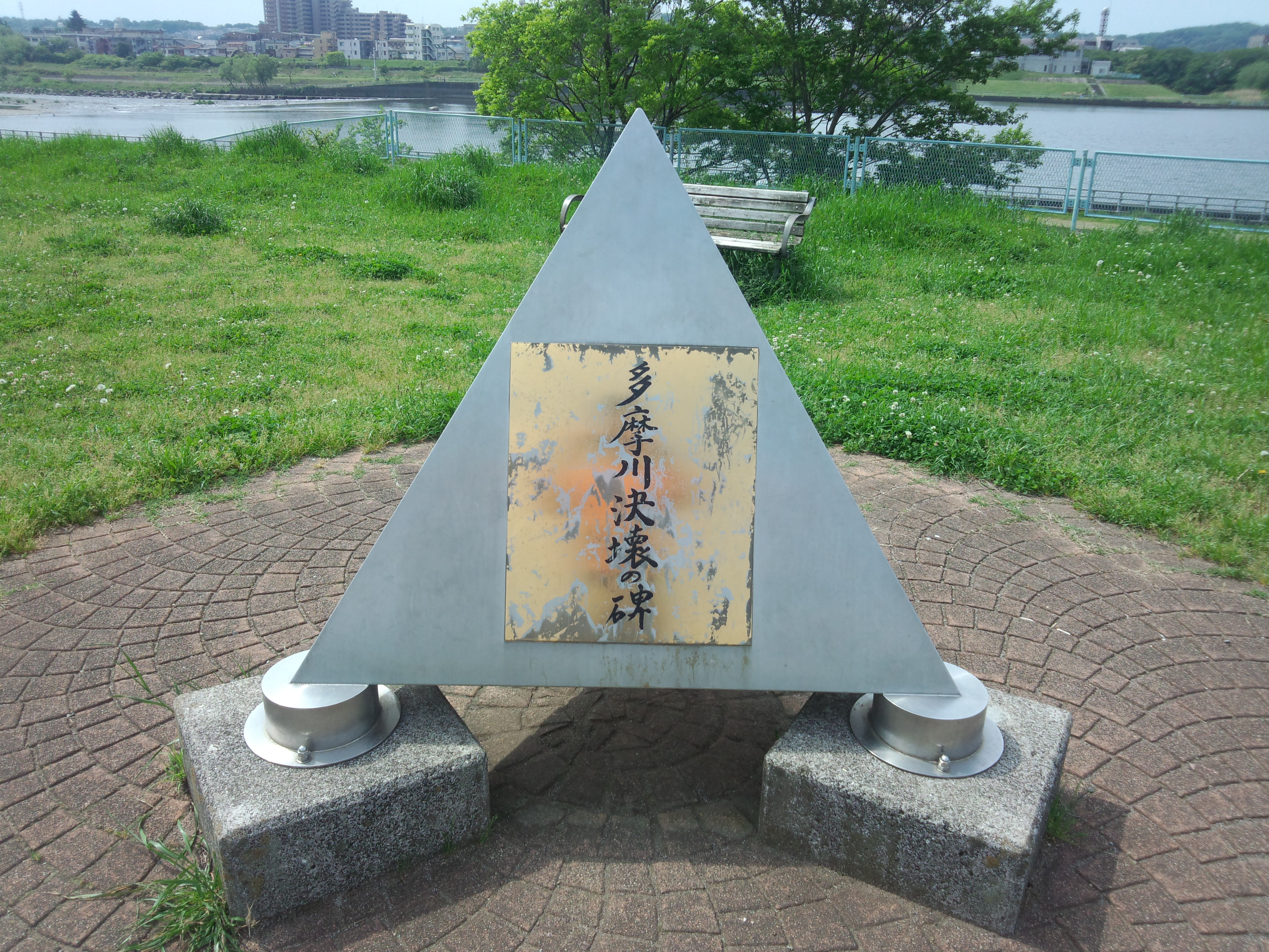 東京都狛江市の多摩川土手に建てられている「多摩川決壊の碑」